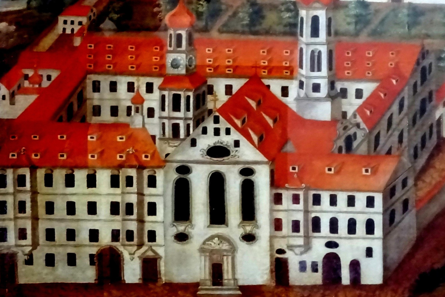 Jesuitenkolleg St. Salvator in Augsburg in der 2. Hälfte des 17. Jahrhunderts